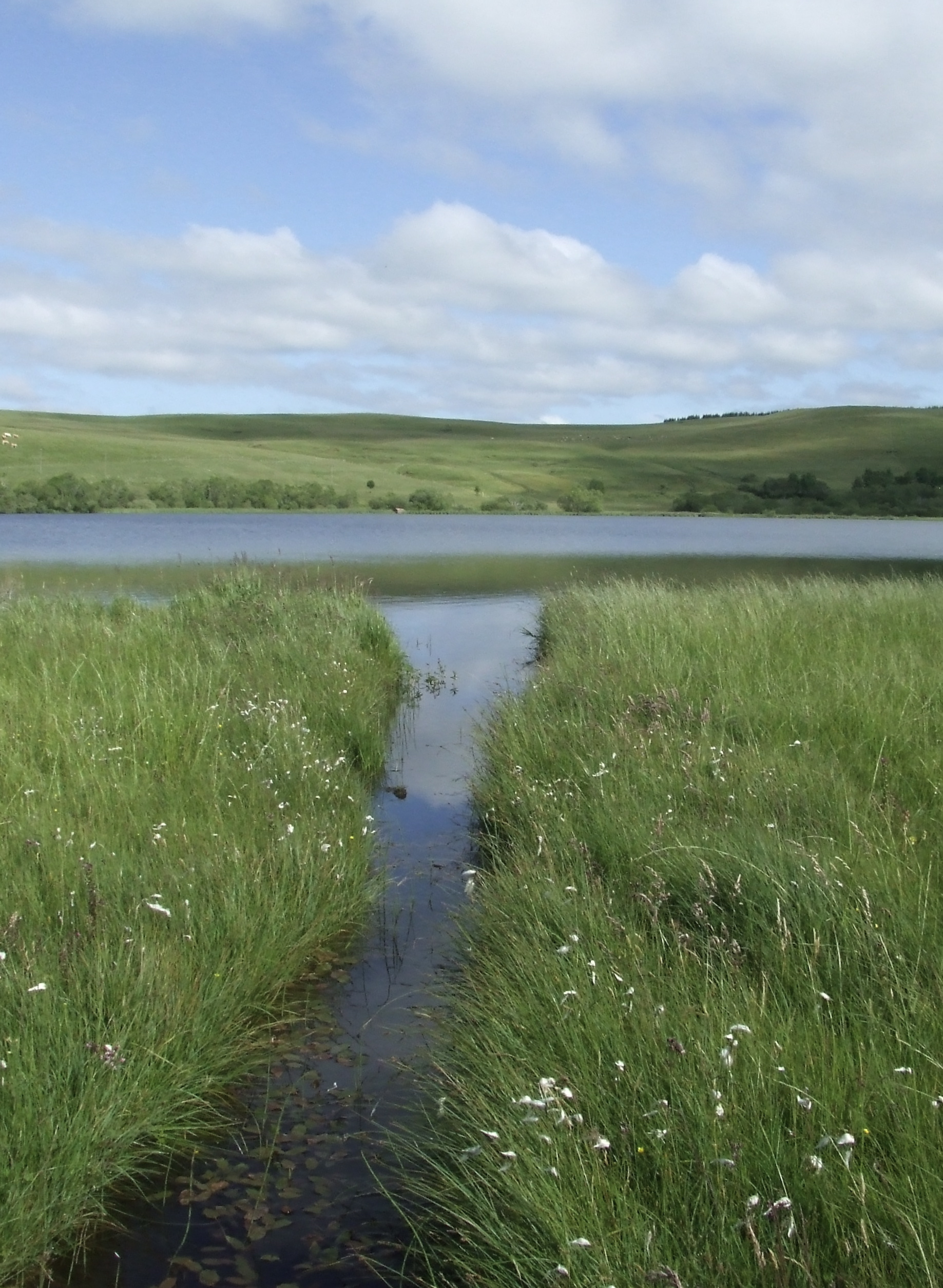 drains creusés dans les prairies bordant le Lac-d'en-Bas, La Godivelle, département du Puy-de-Dôme, France.